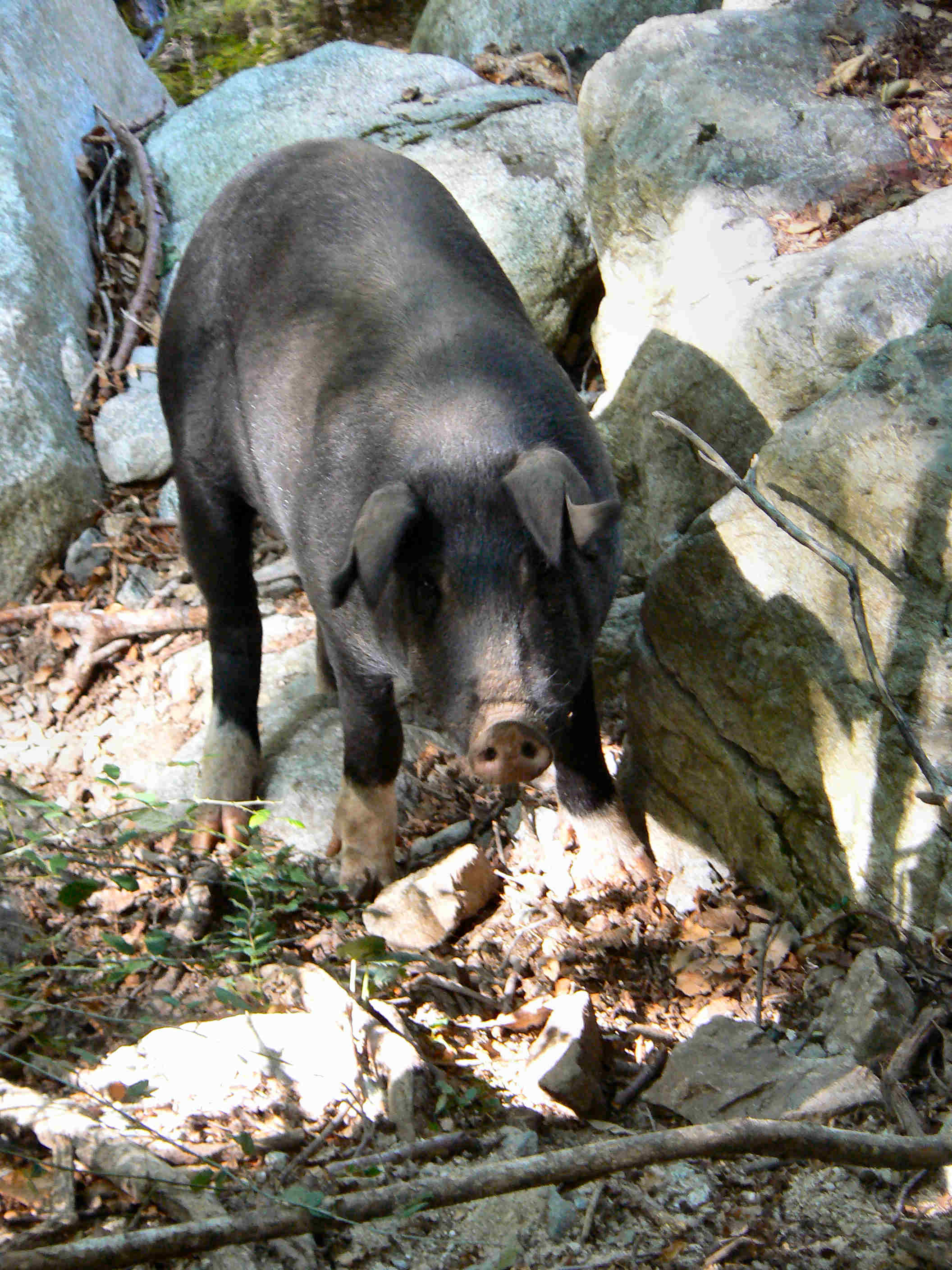 Halbwildes Schwein auf Korsika